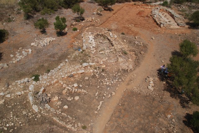 Panoràmica general de les Navetes I i II Closos de can Gaià, Portocolom - Mallorca